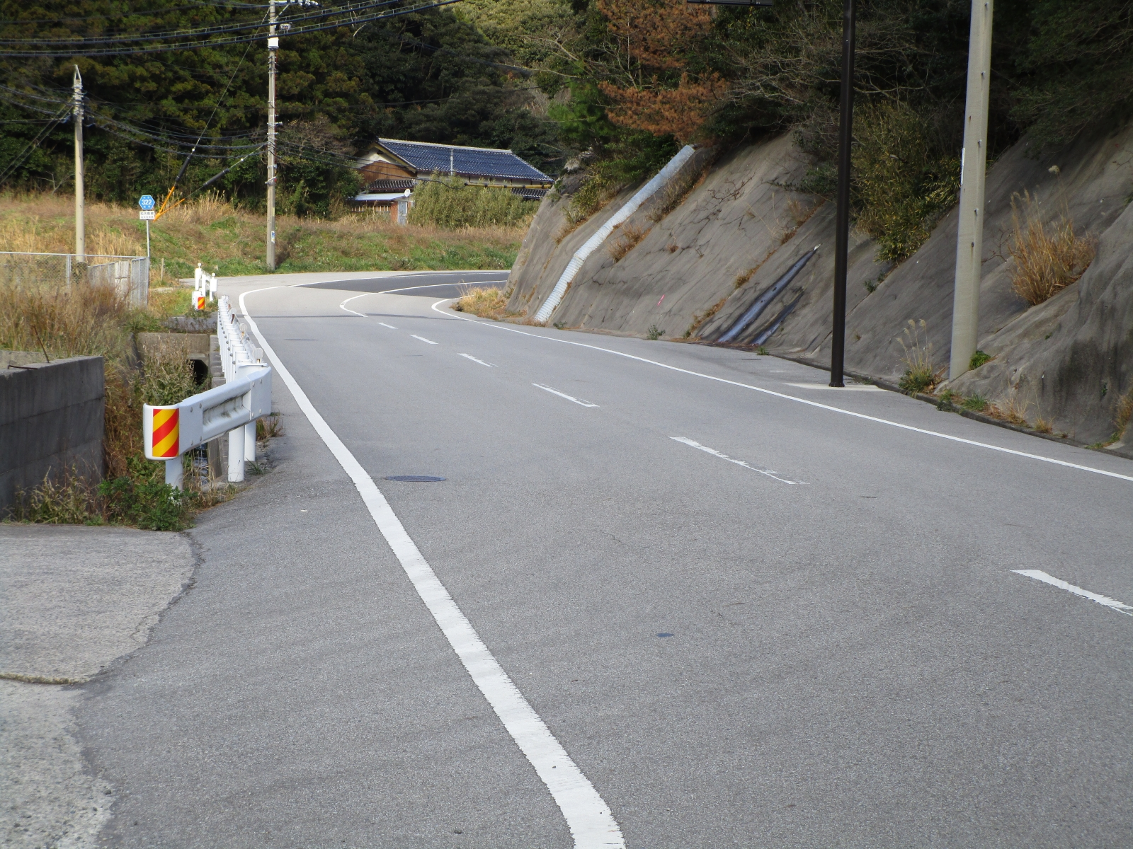 島根県道322号知夫島線（願成寺入り口付近より撮影）